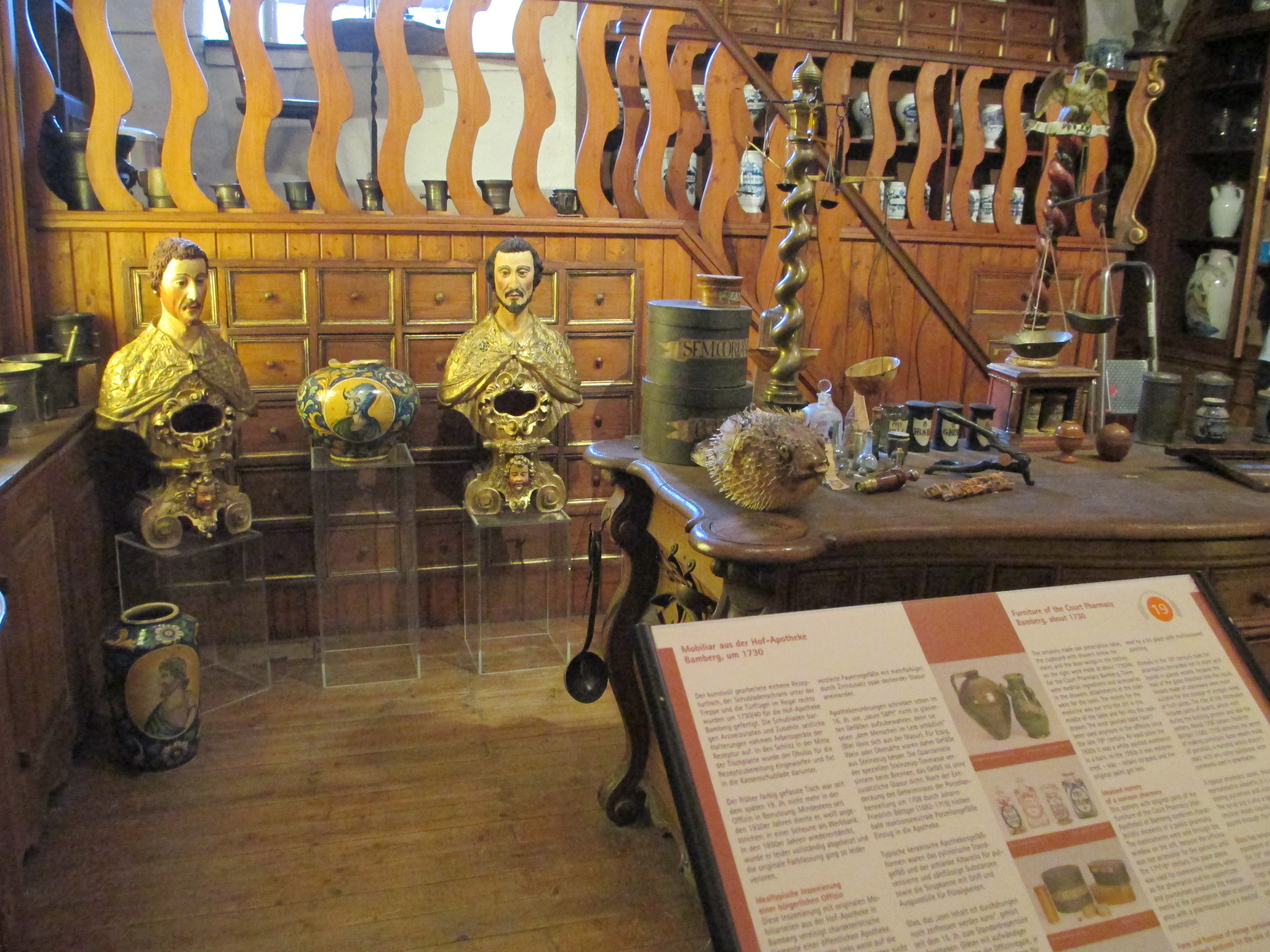 מוזיאון הרוקחות בטירת היידלברג